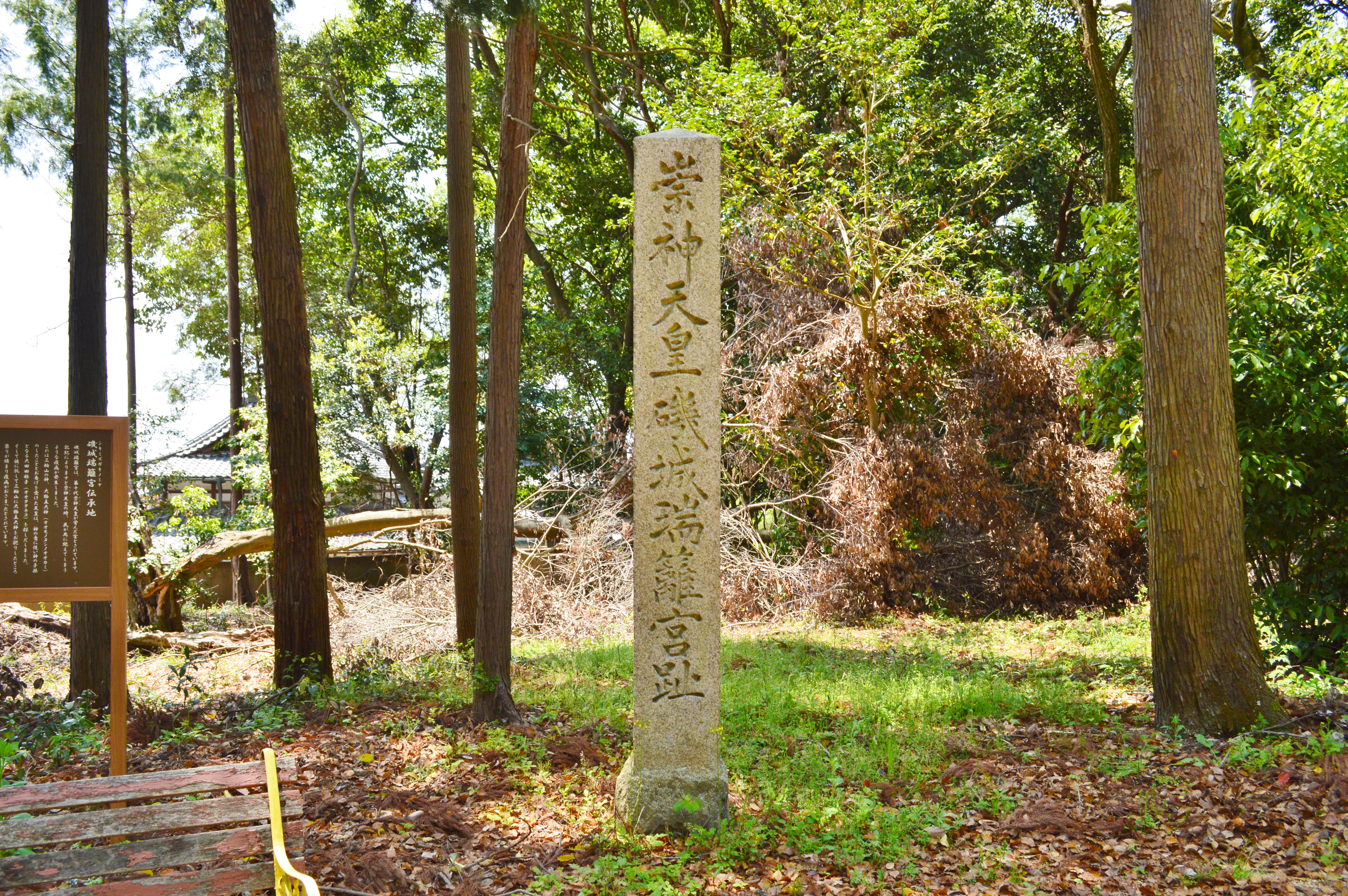 志貴御縣坐神社 崇神天皇磯城瑞籬宮趾碑 Nikon D3200